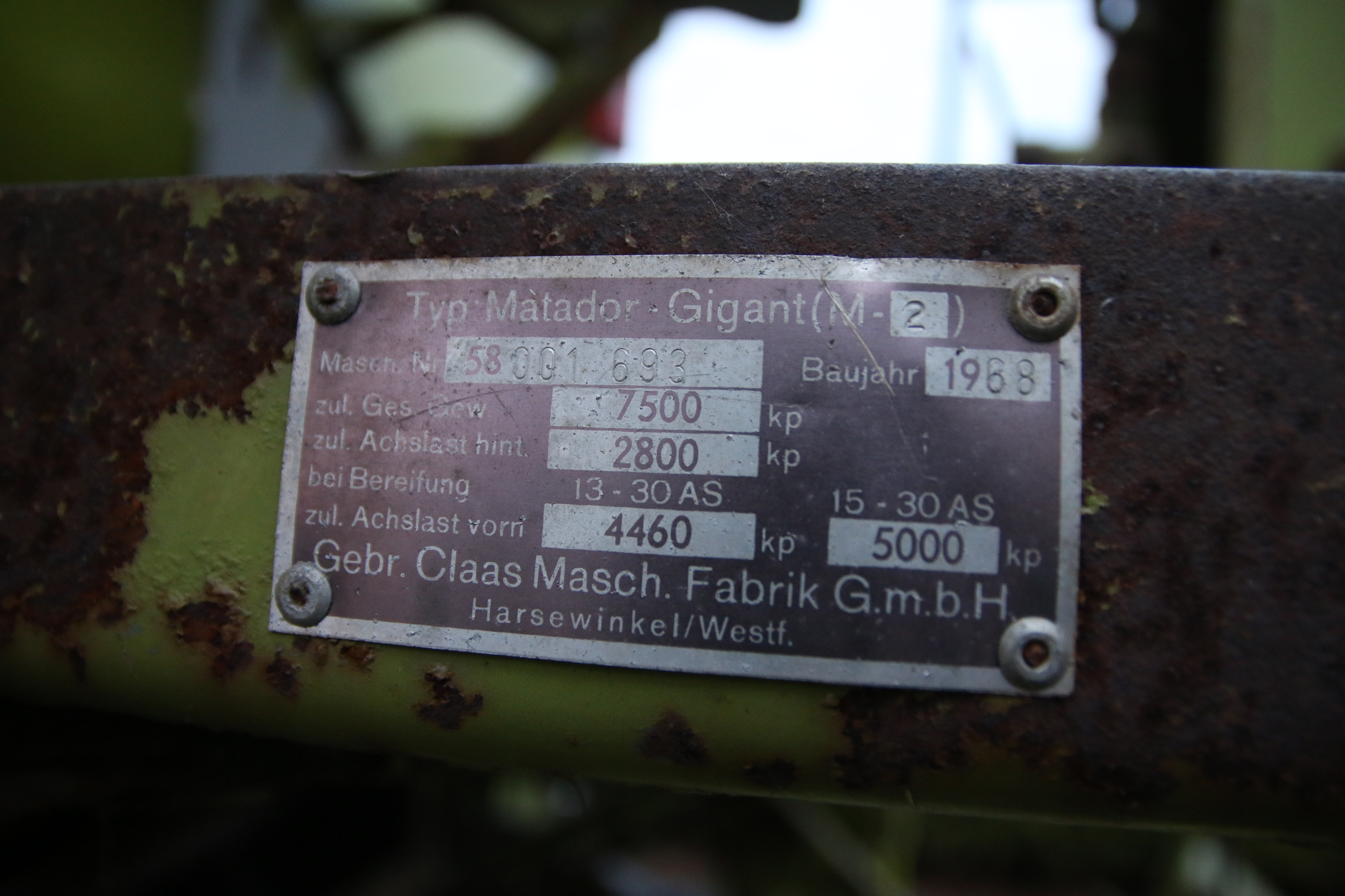 Typenschild Matador Gigant